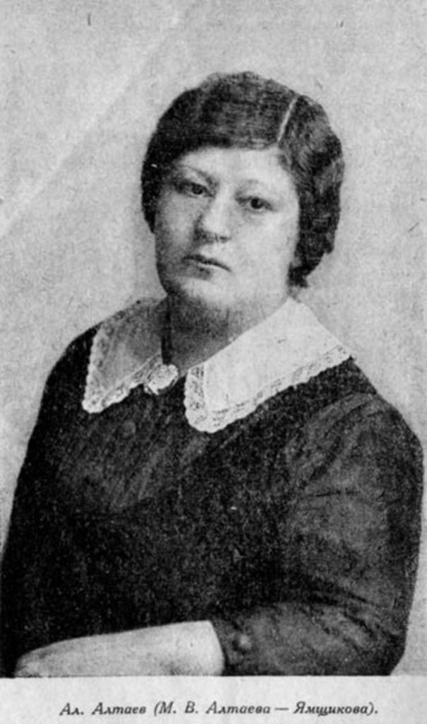 Ал. Алтаев (настоящее имя Маргарита Владимировна Ямщикова), (1872 - 1959) - русский прозаик, публицист, мемуарист